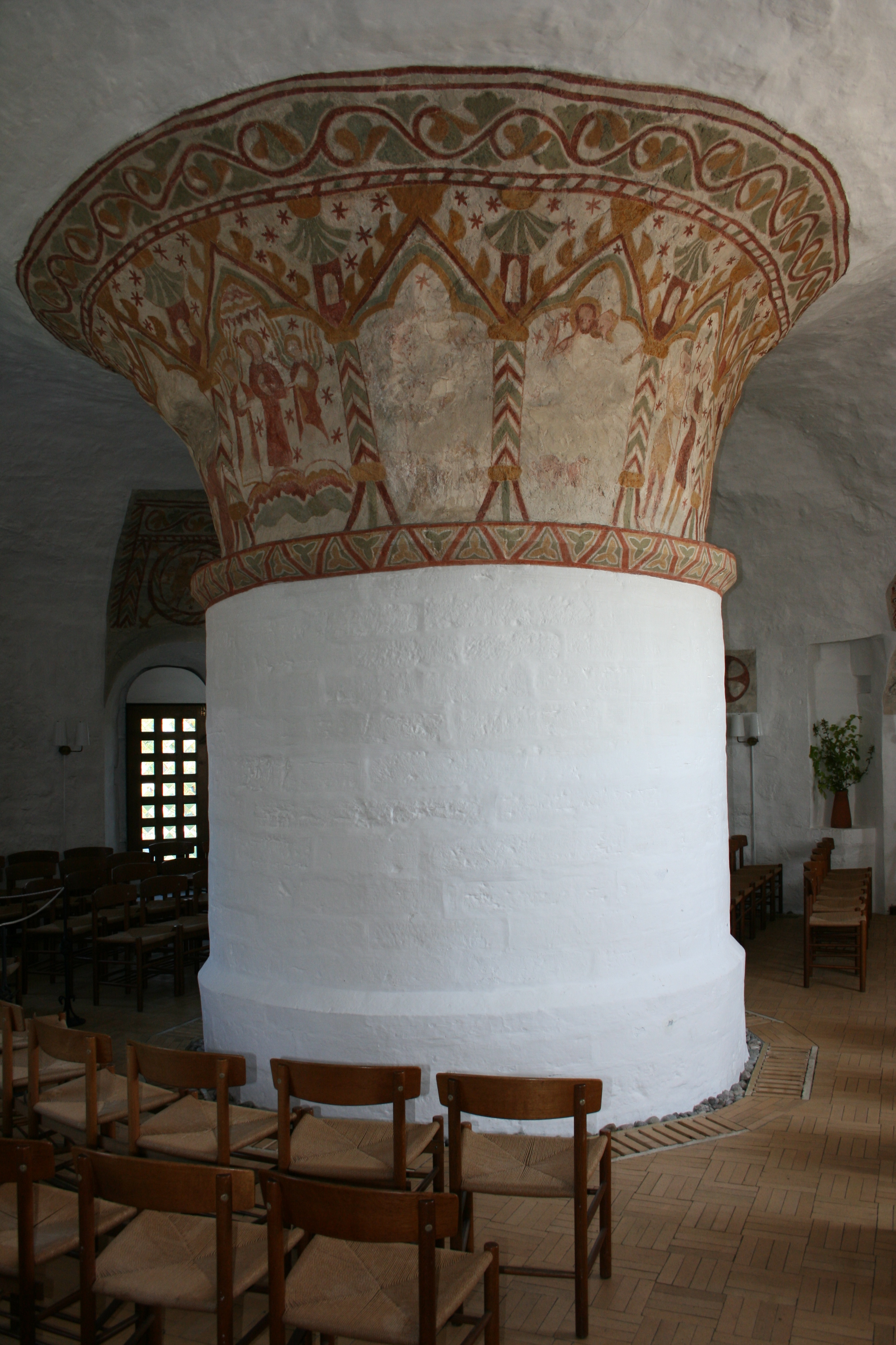 Ny Kirke interiør 2